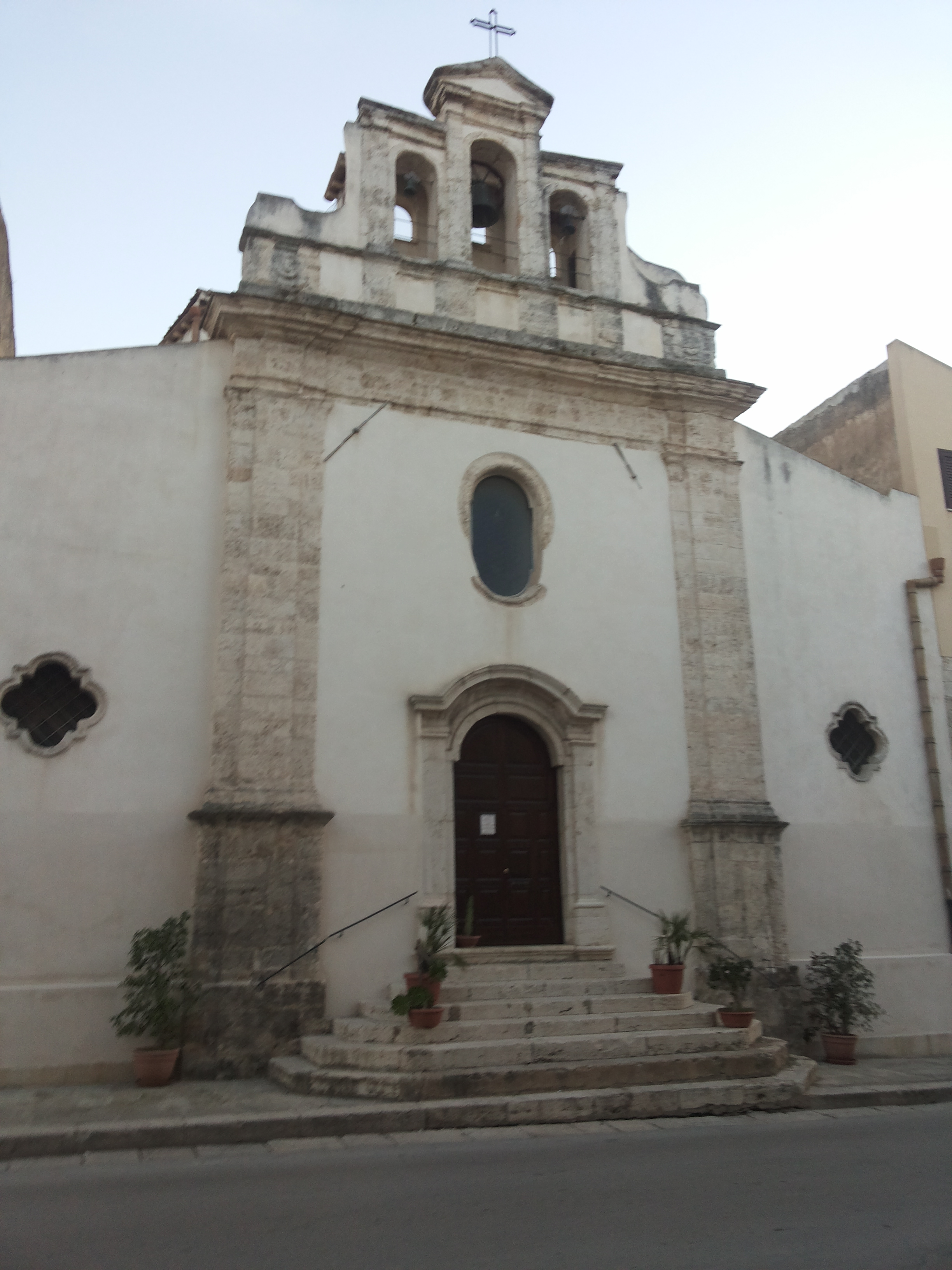 Chiesa della SS Trinità ad Alcamo